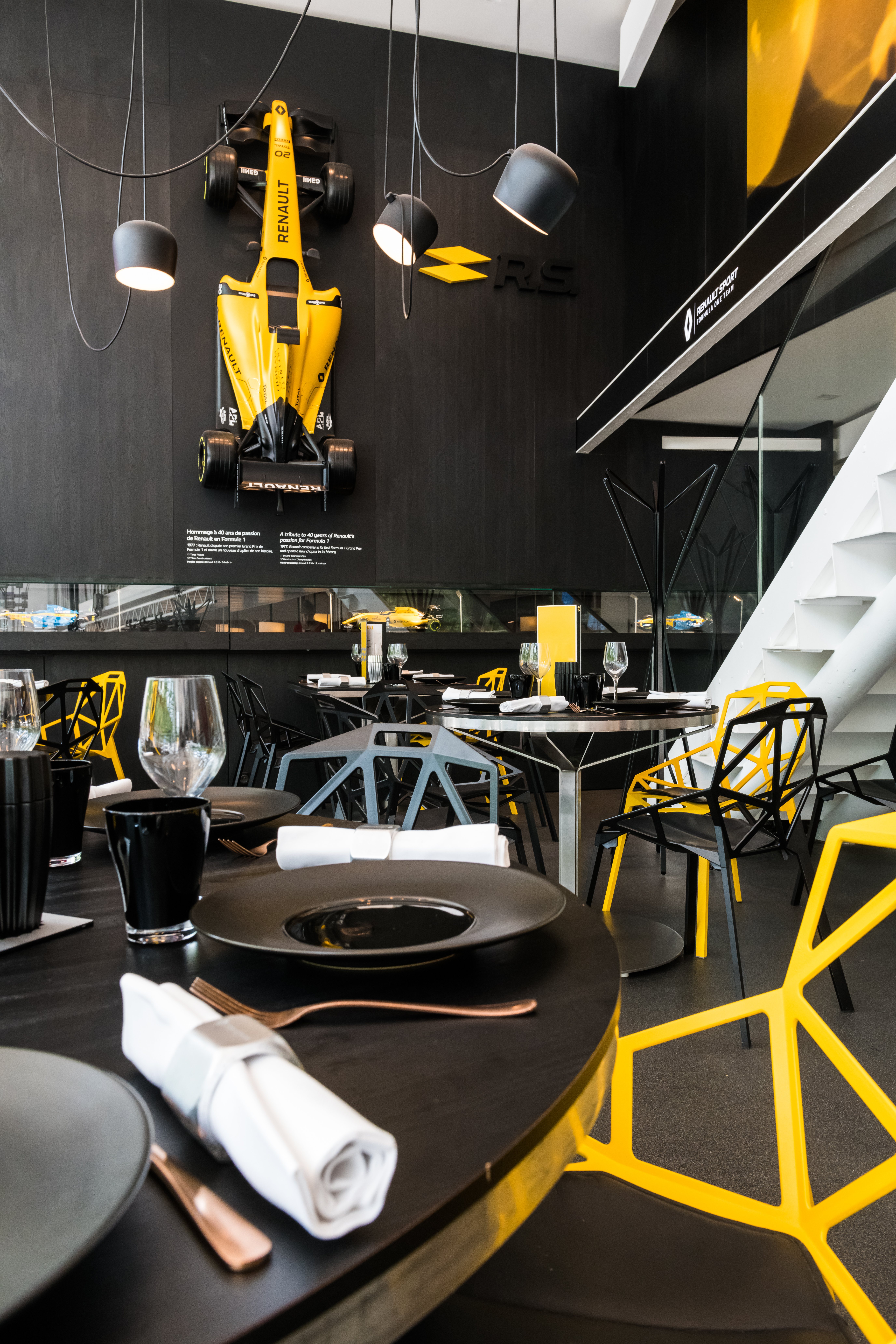 Corner food atypique dédié à la Formule 1 au sein du restaurant de L'Atelier Renault